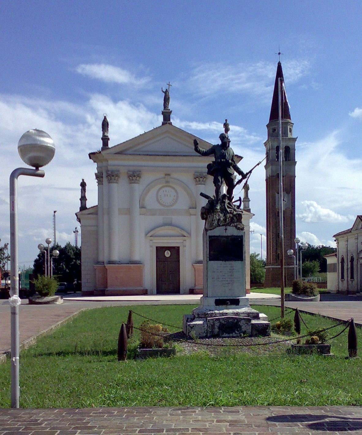 Ramon, frazione di Loria: la chiesa parrocchiale di San Pancrazio.